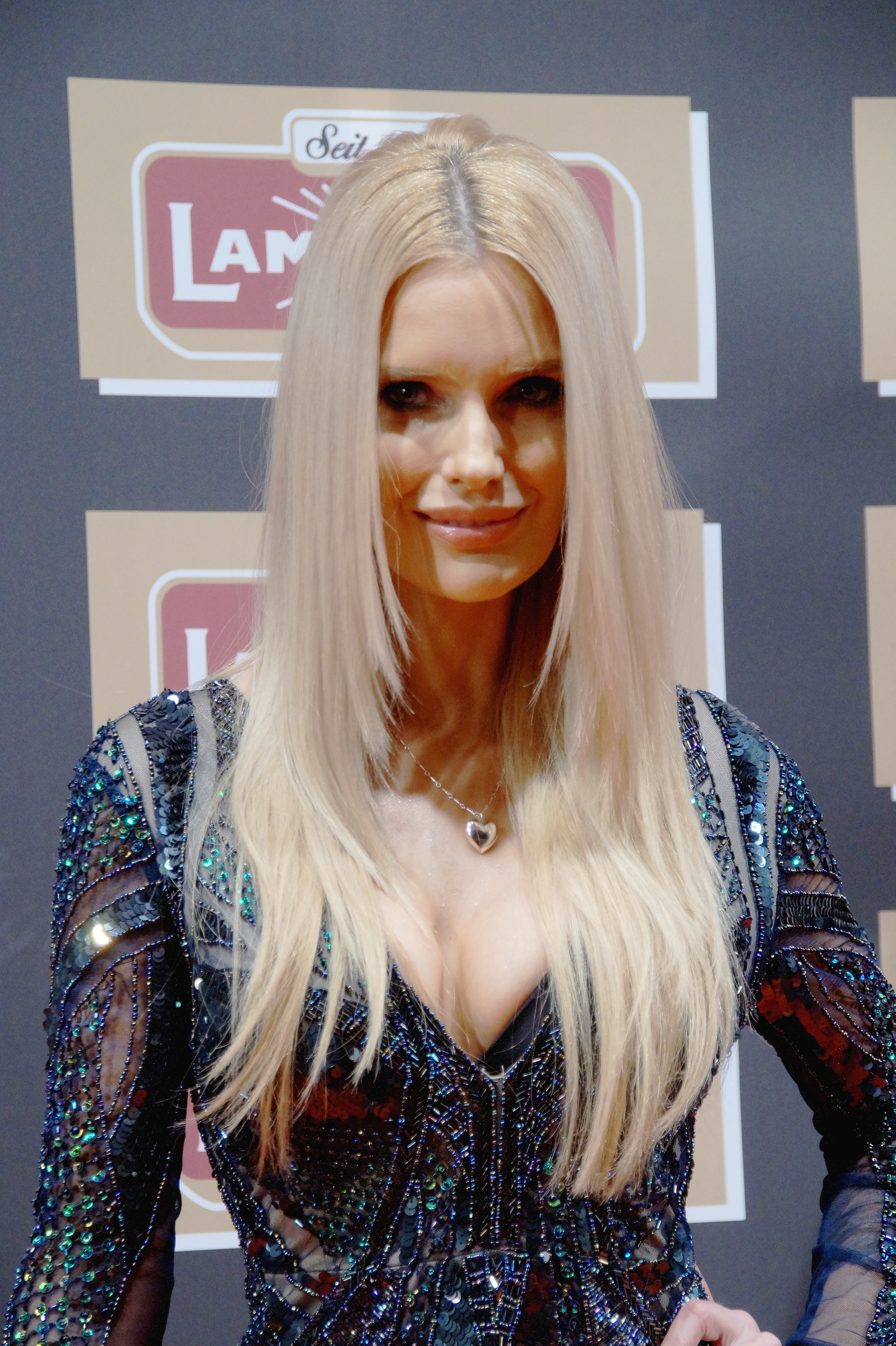 Mirja du Mont bei der Lambertz Monday Night, im Februar 2016.